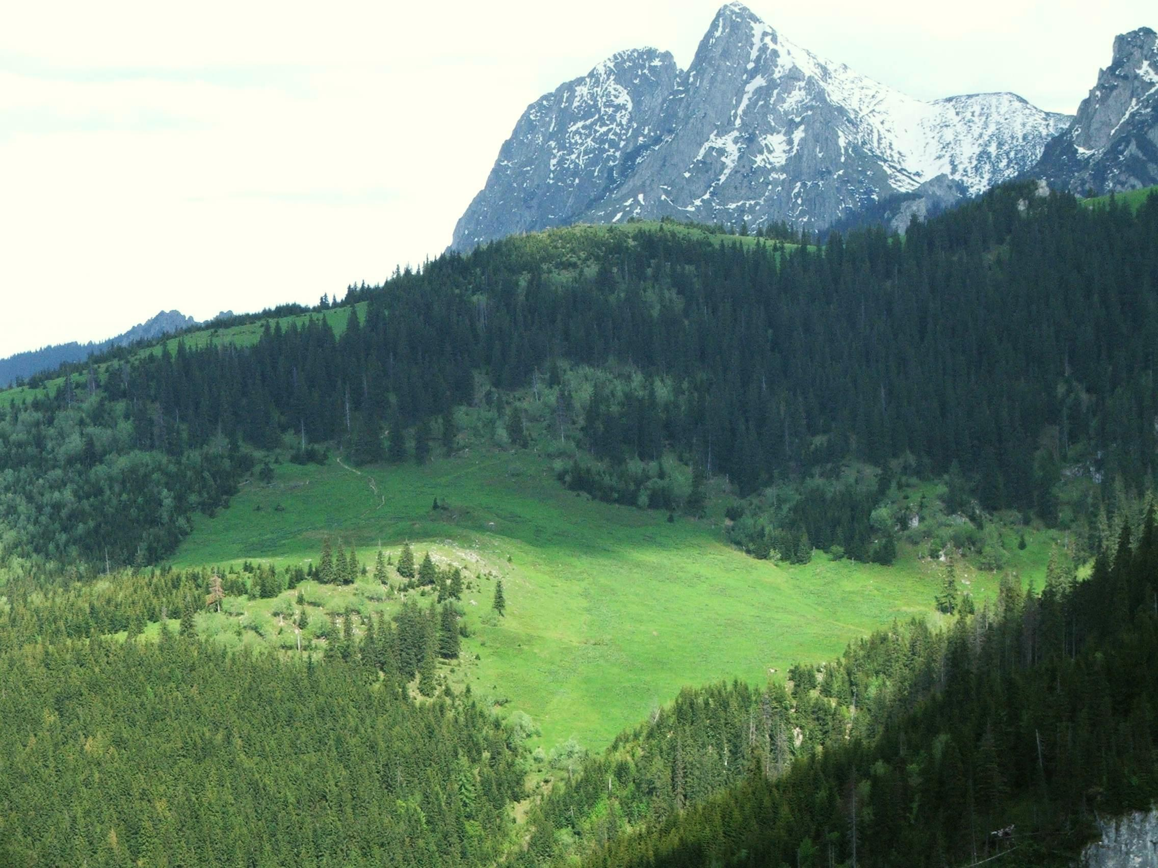 Polana Upłaz - widok z Polany Stoły